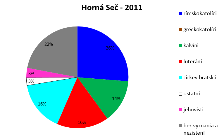 Náboženské zloženie obce Horná Seč podľa sčítania v roku 2011.